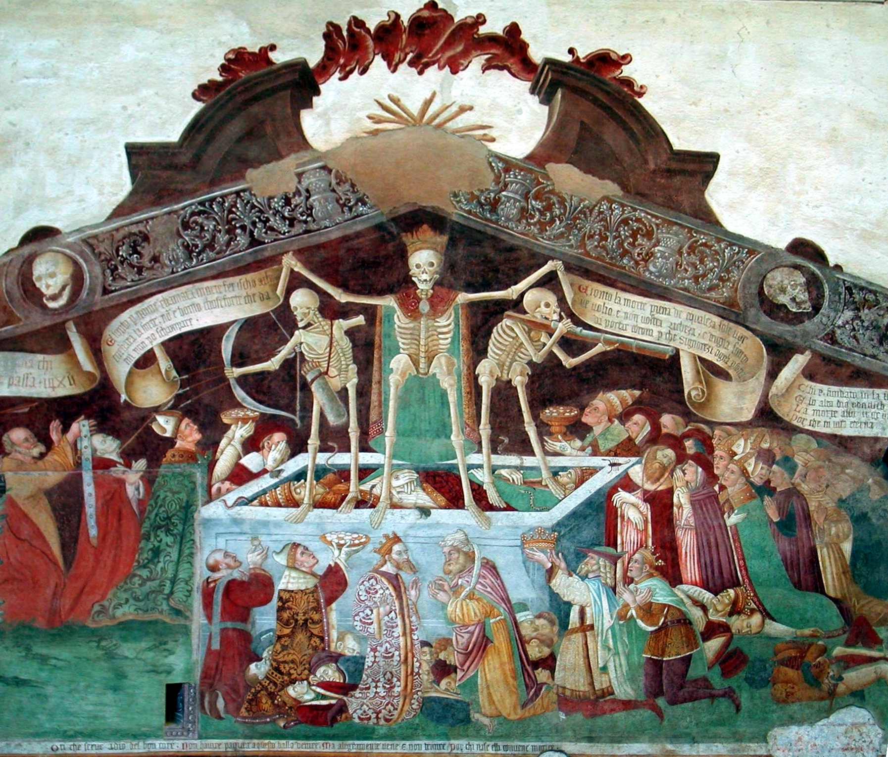 Trionfo della morte, Clusone, Italy XV century On the external wall of the church of Disciplini Author: Paolo Picciati Foto fatta da me e modificata con Gimp (raddrizzata e aumento del contrasto) made by me, december 2005